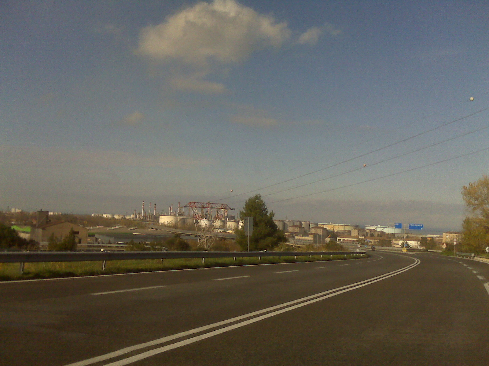 Stabilimento API